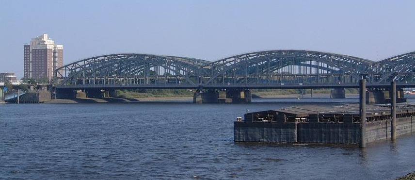 Hamburger Norderelbbrücke